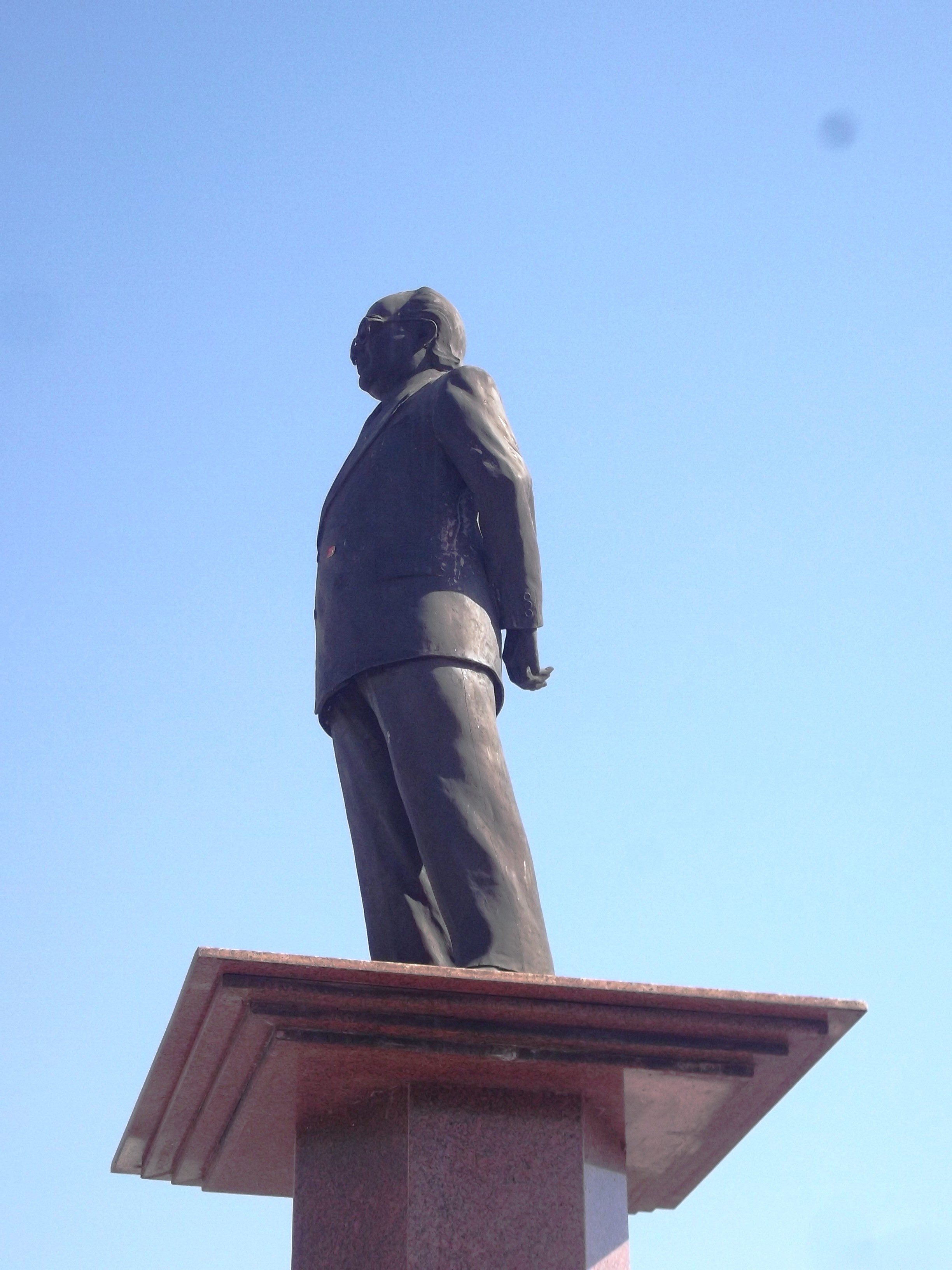 Estátua de Petrôneo Portela, de autoria do escultor Clauberto Santos, na avenida Frei Serafim, em Teresina.